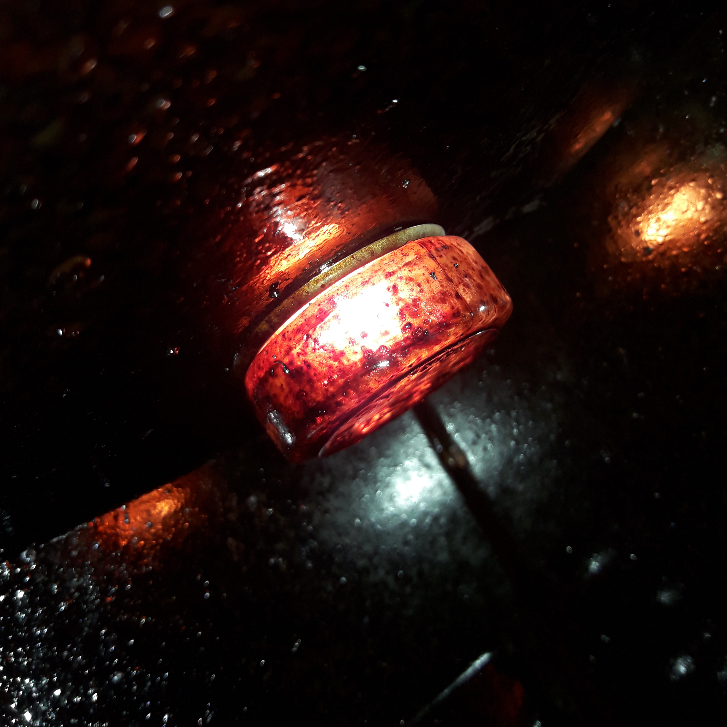 Нагревостойкая лампа в духовке